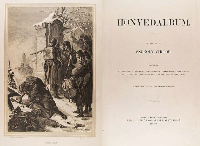 A Honvédalbum 1868-ban jelent meg Pesten Szokoly Viktor szerkesztésében, Emich Gusztáv kiadásában. Az album Munkácsy Mihály alkotásai mellett Wágner Sándor, Litzenmayer Sándor, Benczúr Gyula, Jankó János és Szinyey Pál rajzait tartalmazza. A fametszetek Rusz Károly pesti műhelyében készültek.